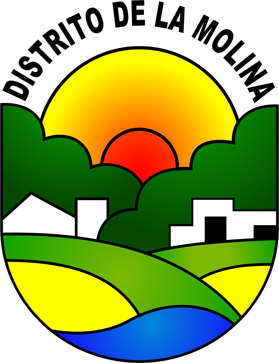 Distrito de La Molina - Provincia de Lima - Región Lima